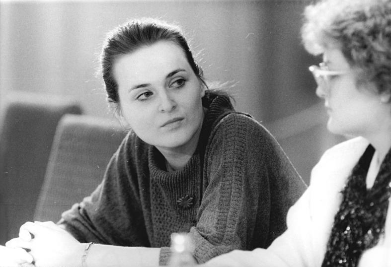 ADN-ZB Zimmermann 22.2.90 Berlin: Wahlkommission Zur Vorsitzenden der DDR-Wahlkommission wurde Petra Bläss vom Unabhängigen Frauenverband gewählt. Sie erhielt zwölf der in geheimer Wahl abgegebenen 27 Stimmen.